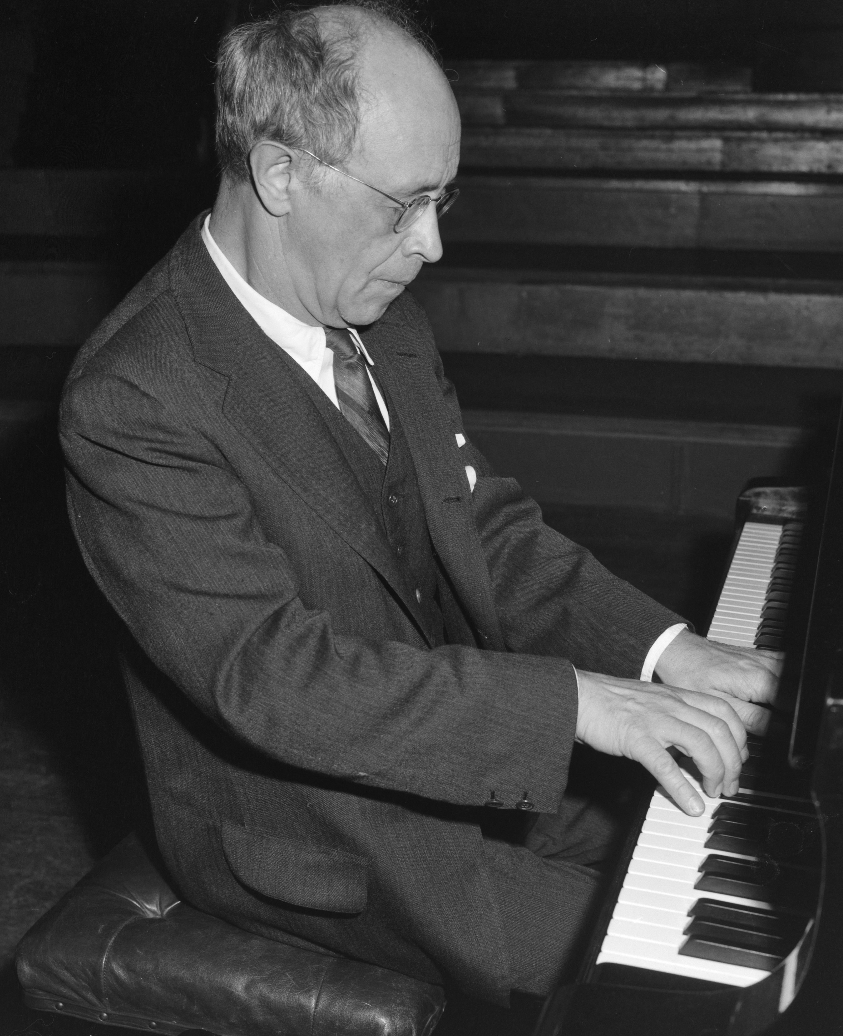 De meesterpianist Rudolf Serkin hier tijdens de repetitie in het Concertgebouw